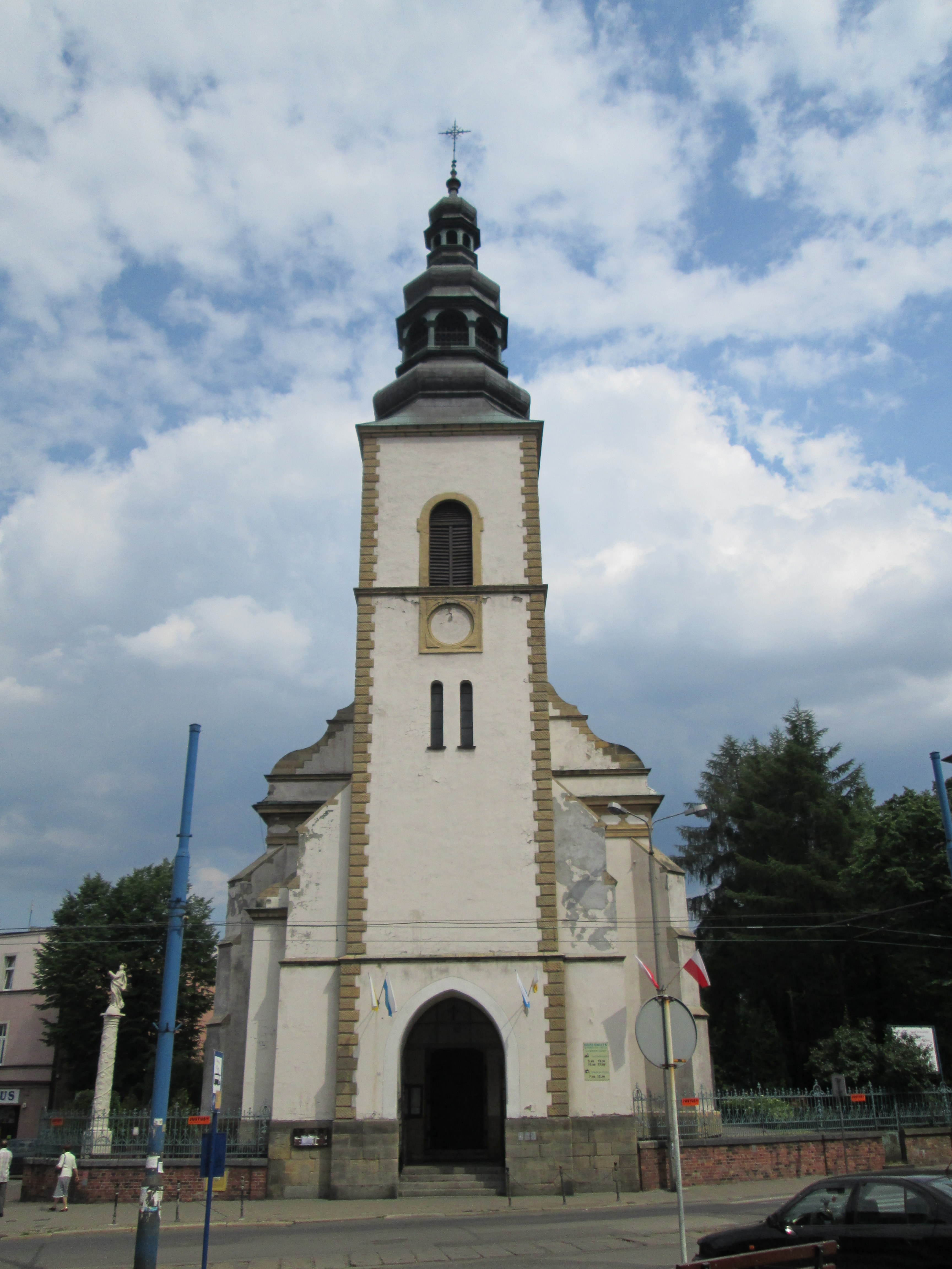 Mysłowice, kościół par. pw. Narodzenia NMP, XIV w., 1740-1744, 1901-1903